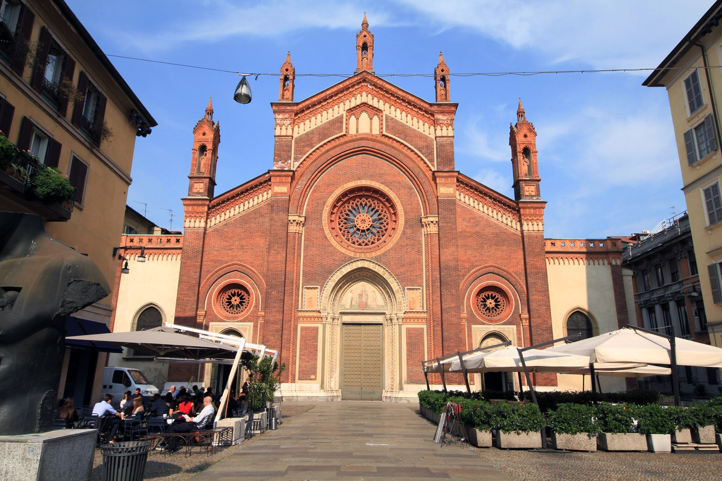 Santa Maria del Carmine